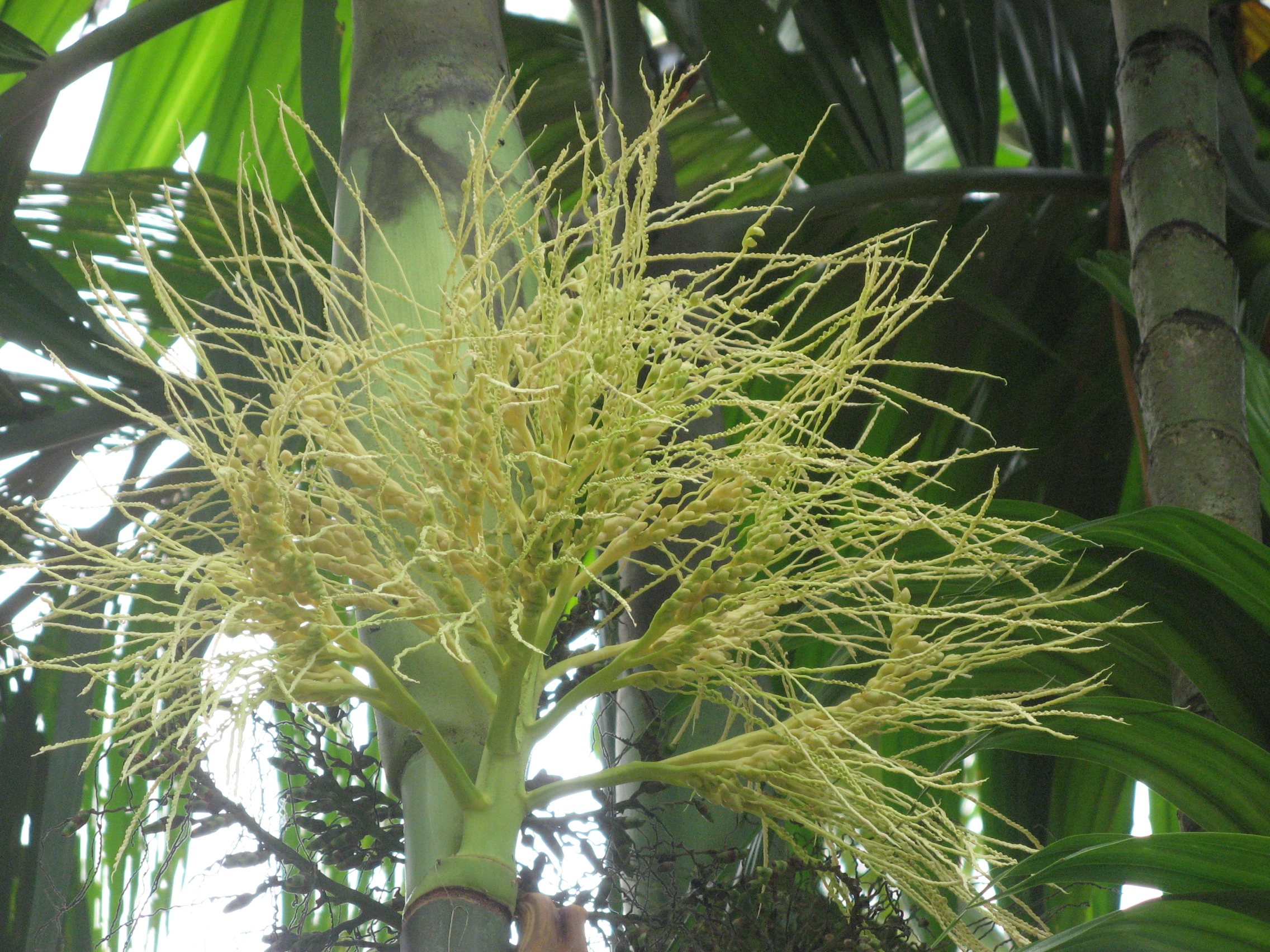 Adakkakkula